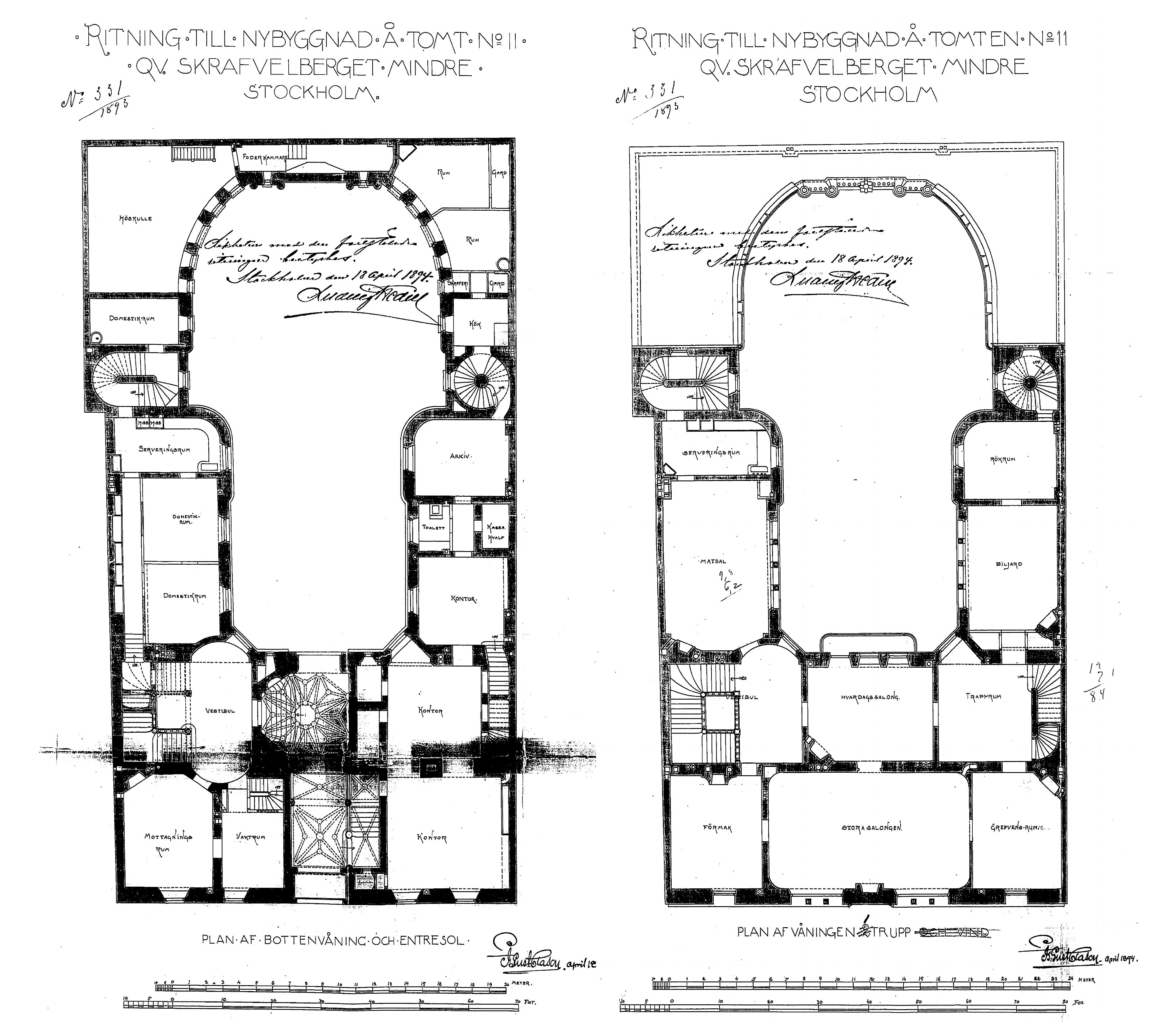 Hallwylska palatset planritningar